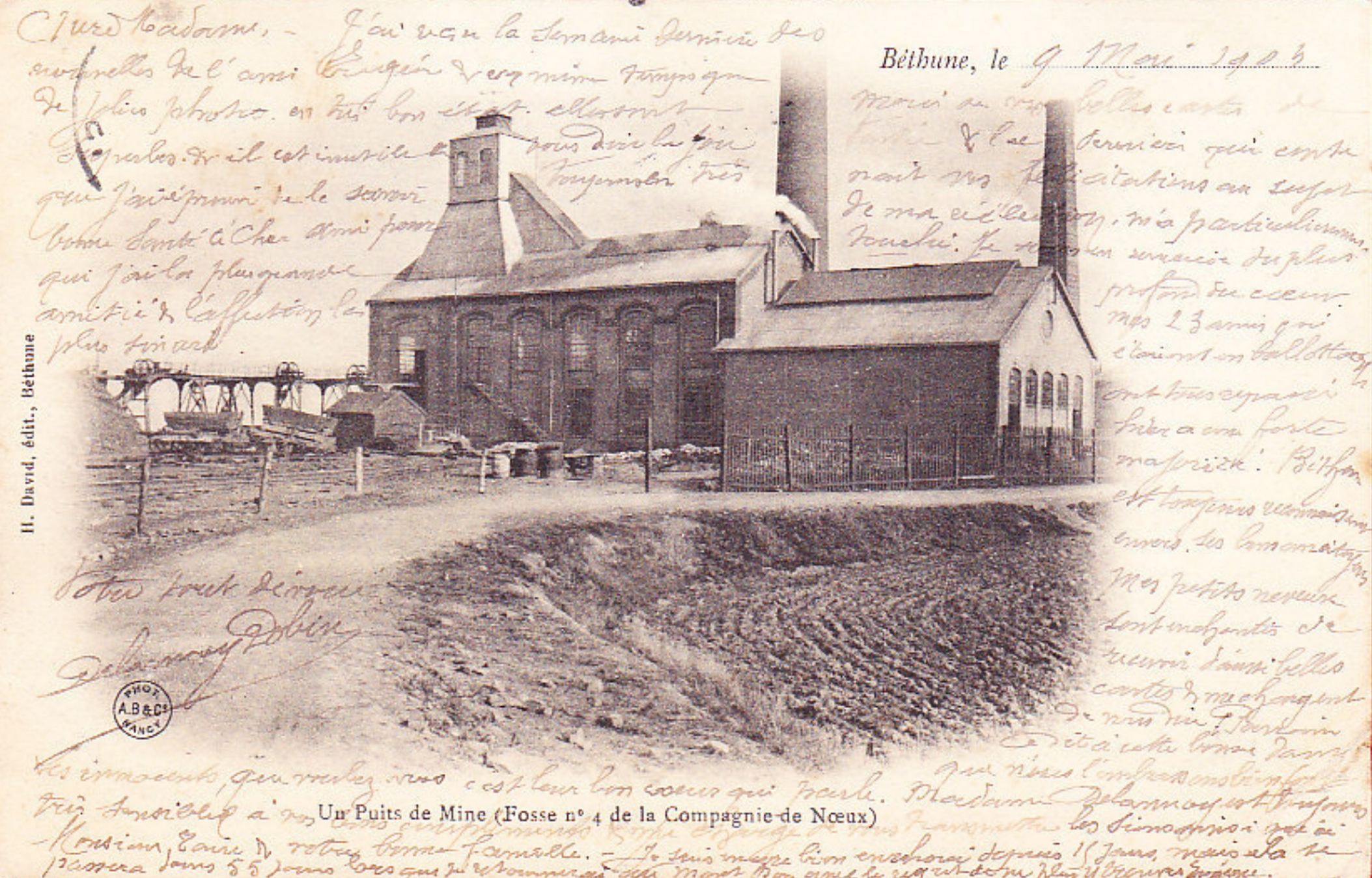 La Fosse n° 4 - 4 bis de la Compagnie des mines de Nœux était un charbonnage constitué de deux puits situé à Hersin-Coupigny, Pas-de-Calais, Nord-Pas-de-Calais, France.